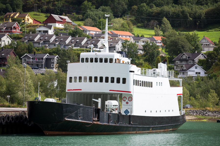 MF «Lustrafjord» ligger til kai i Gaupne i 2015.